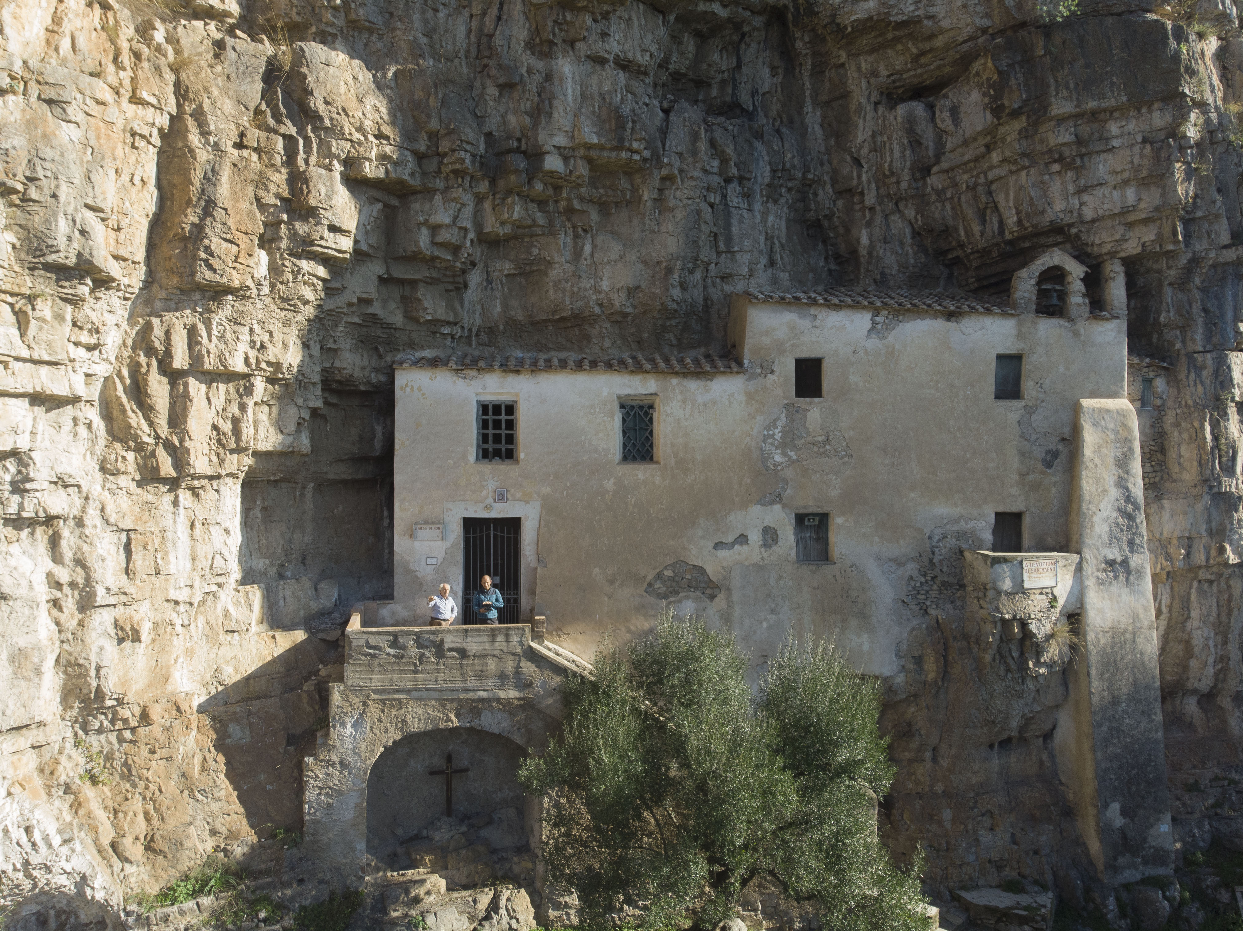 Foto scatta con drone dell'eremo di San Magno a San Mango Piemonte (Salerno)